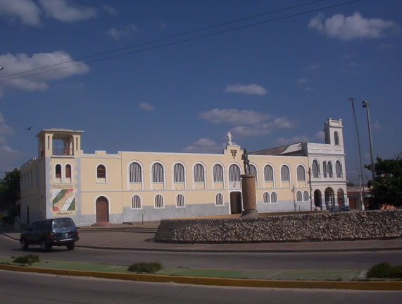 Convento de los padres capuchinos, Riohacha - Colombia